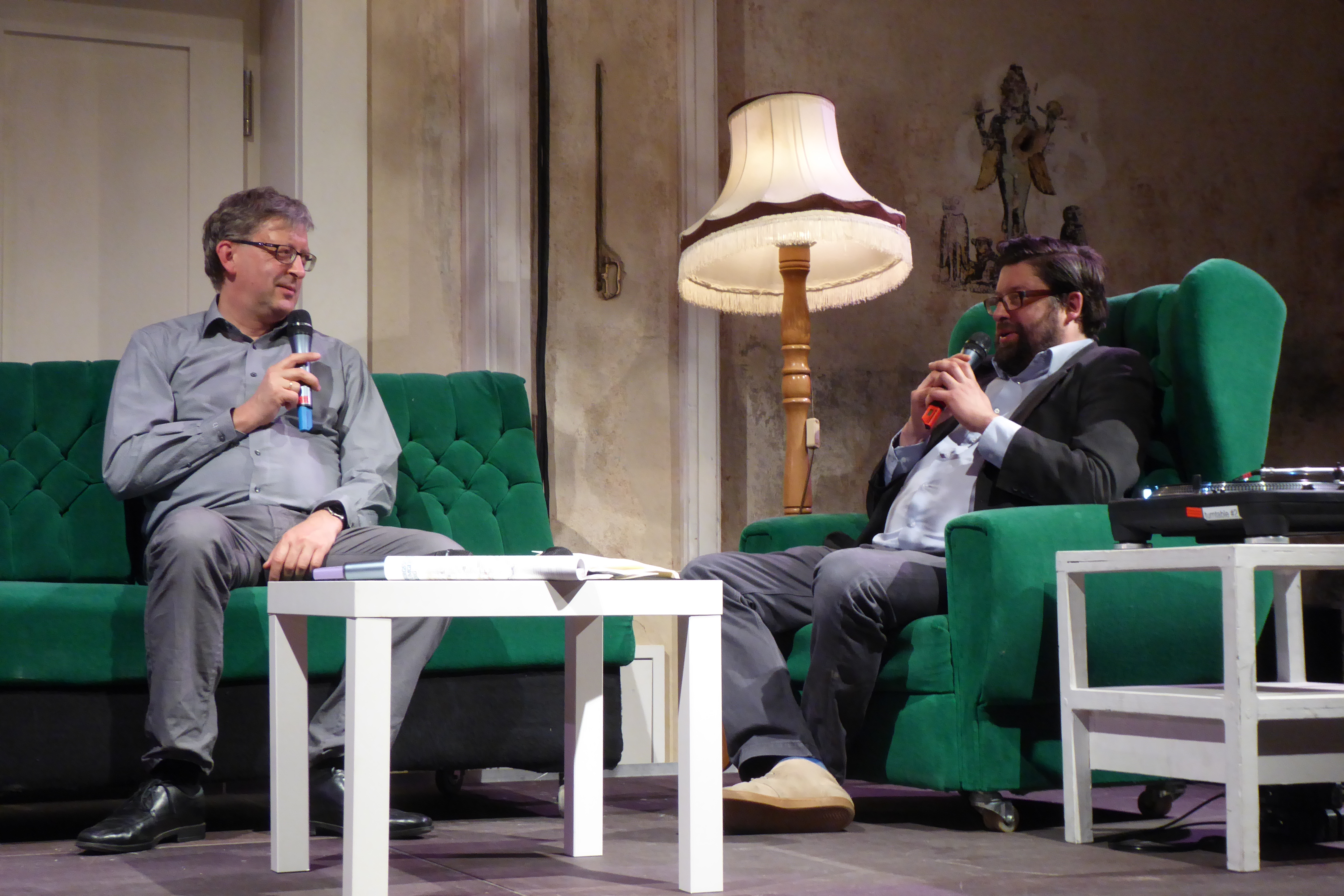 Hans-Christoph Rademann (links) im Gespräch mit seinem Bruder Max Rademann (rechts) beim Diensttagssalon im Festspielhaus Hellerau